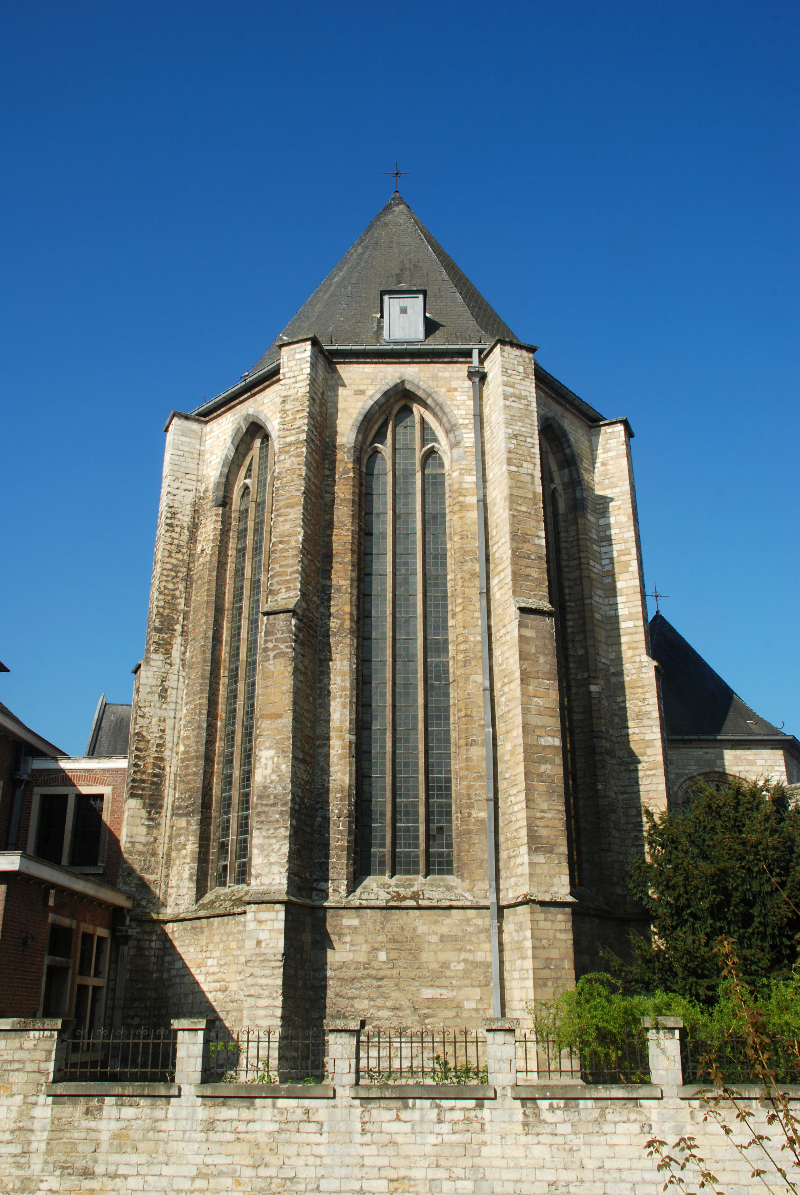 Belgique - Louvain - Église Sainte-Gertrude